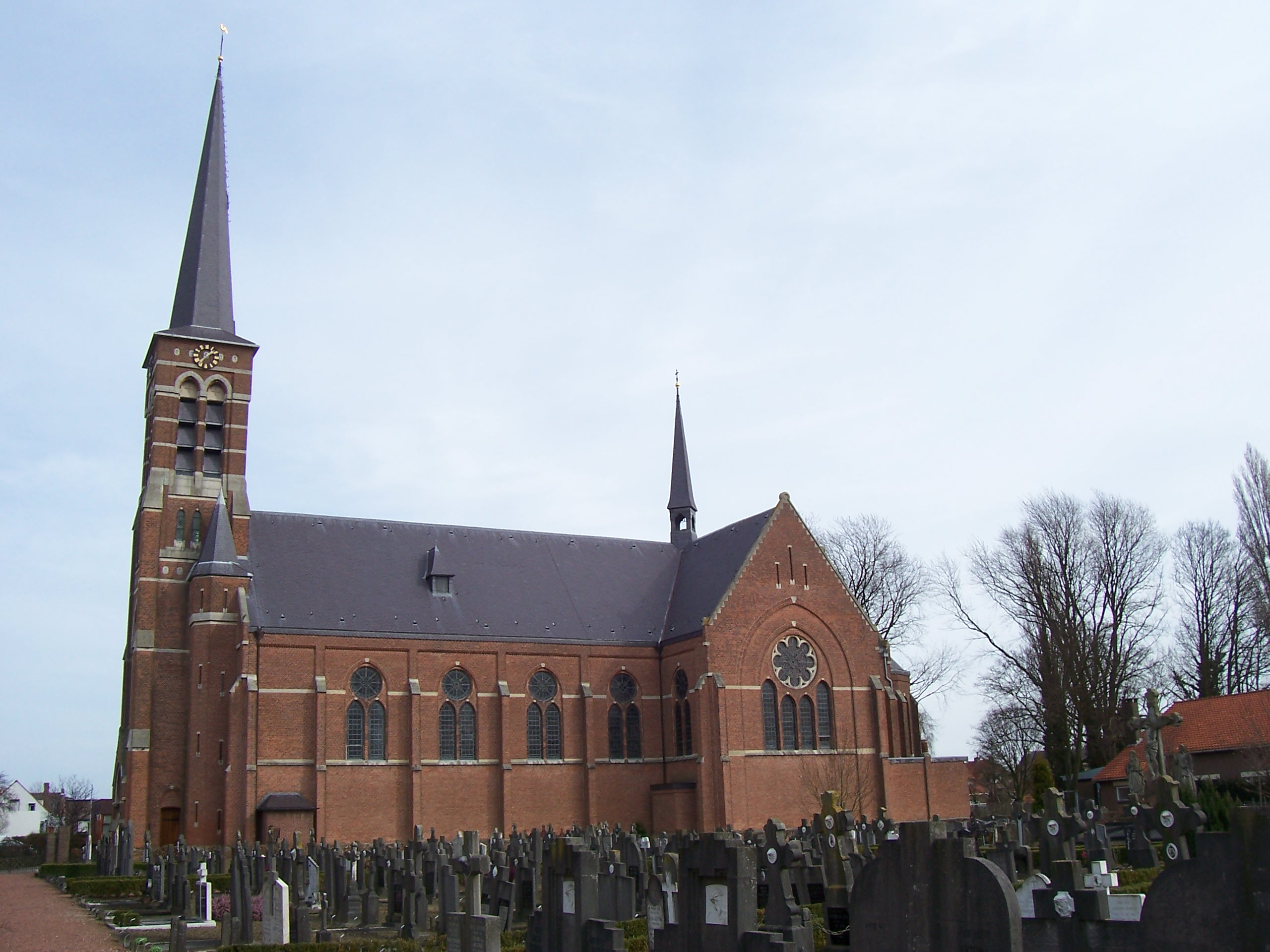 Bonifatiuskerk te Kwadendamme